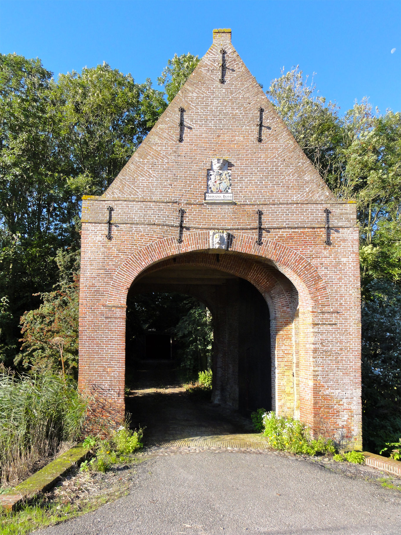 Poortgebouw Sjucksmastate in Waaxens, rijksmonument